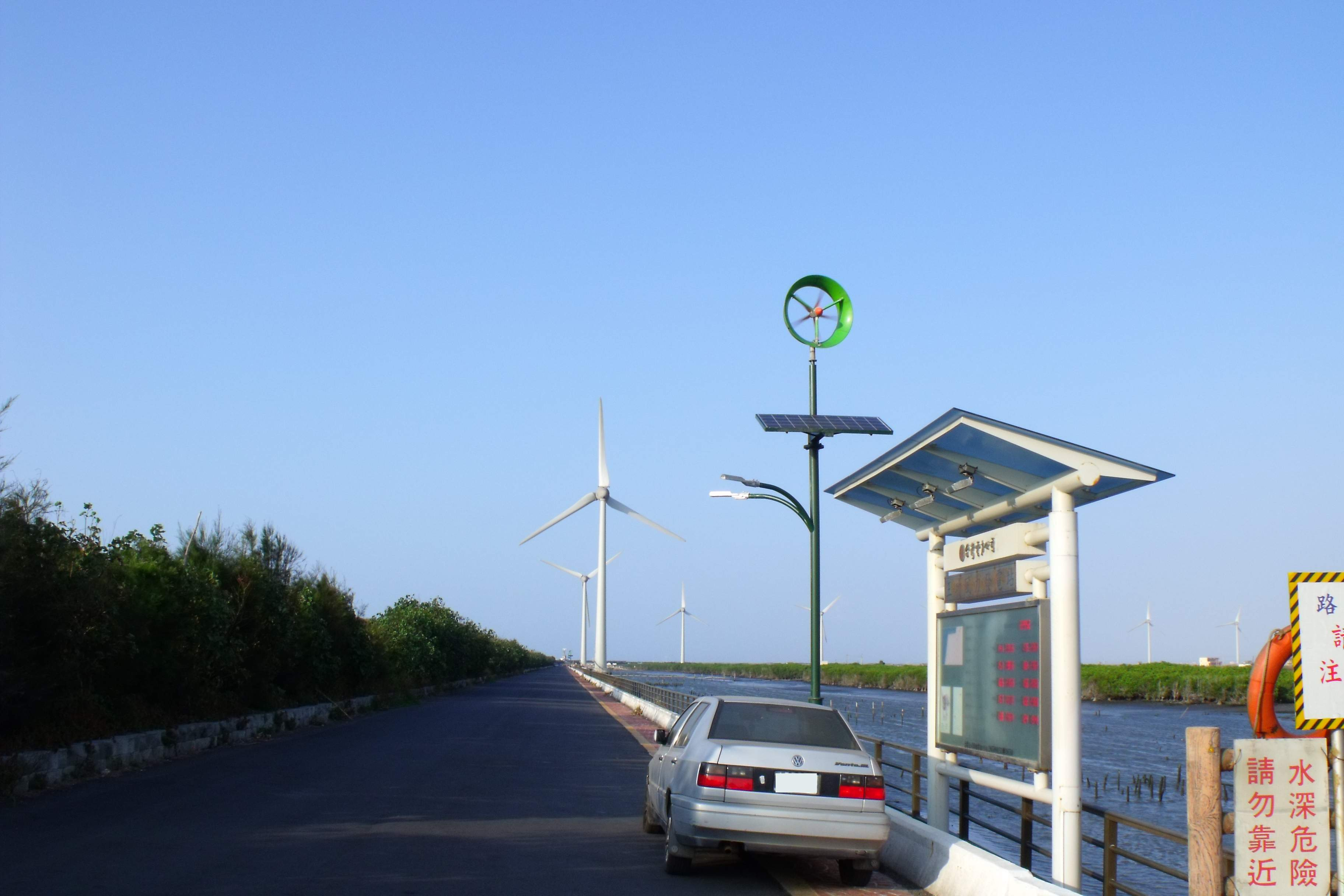 王功漁港